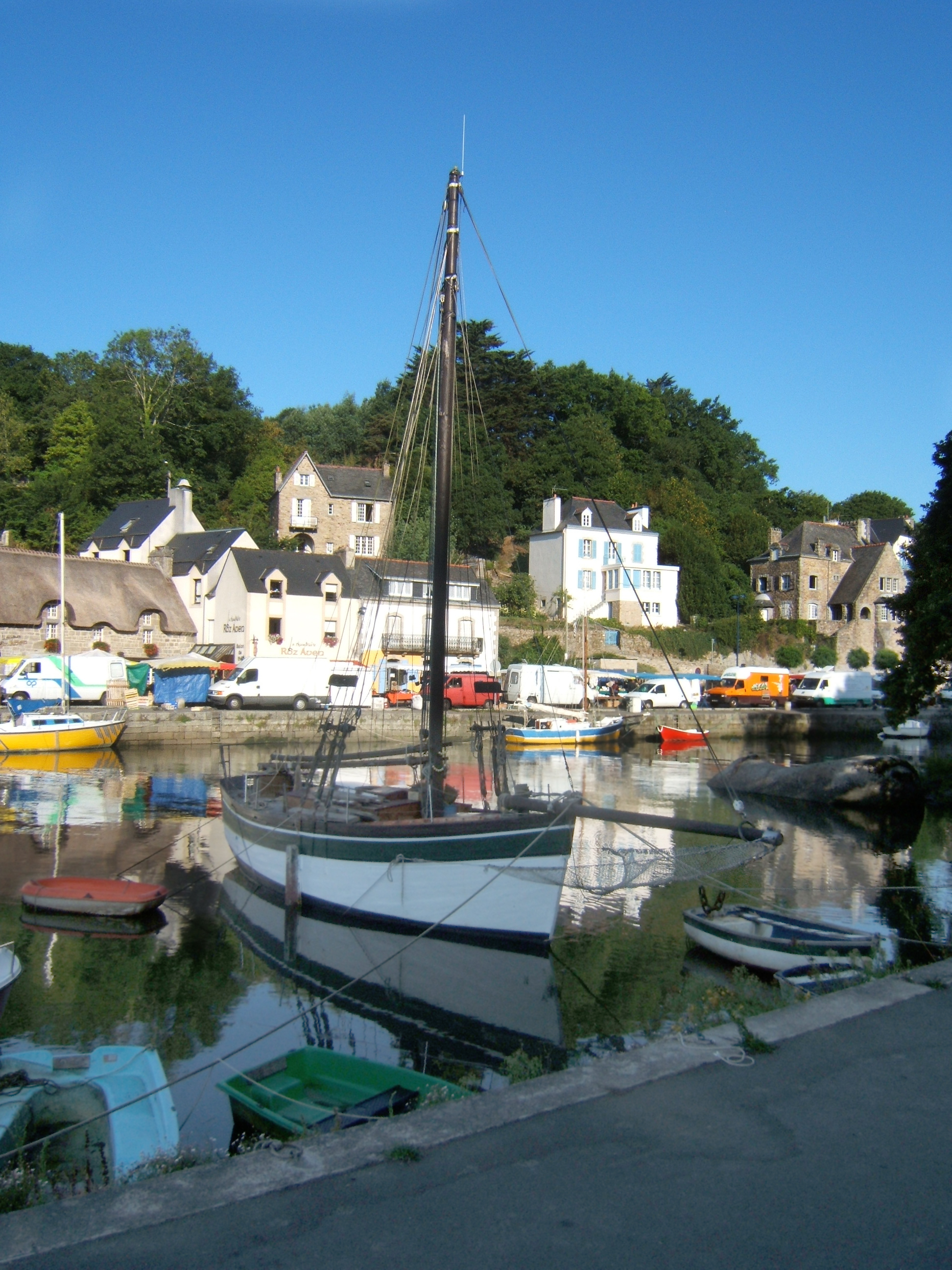 Le port de Pont-Aven, un matin de fête de l'Assomption.